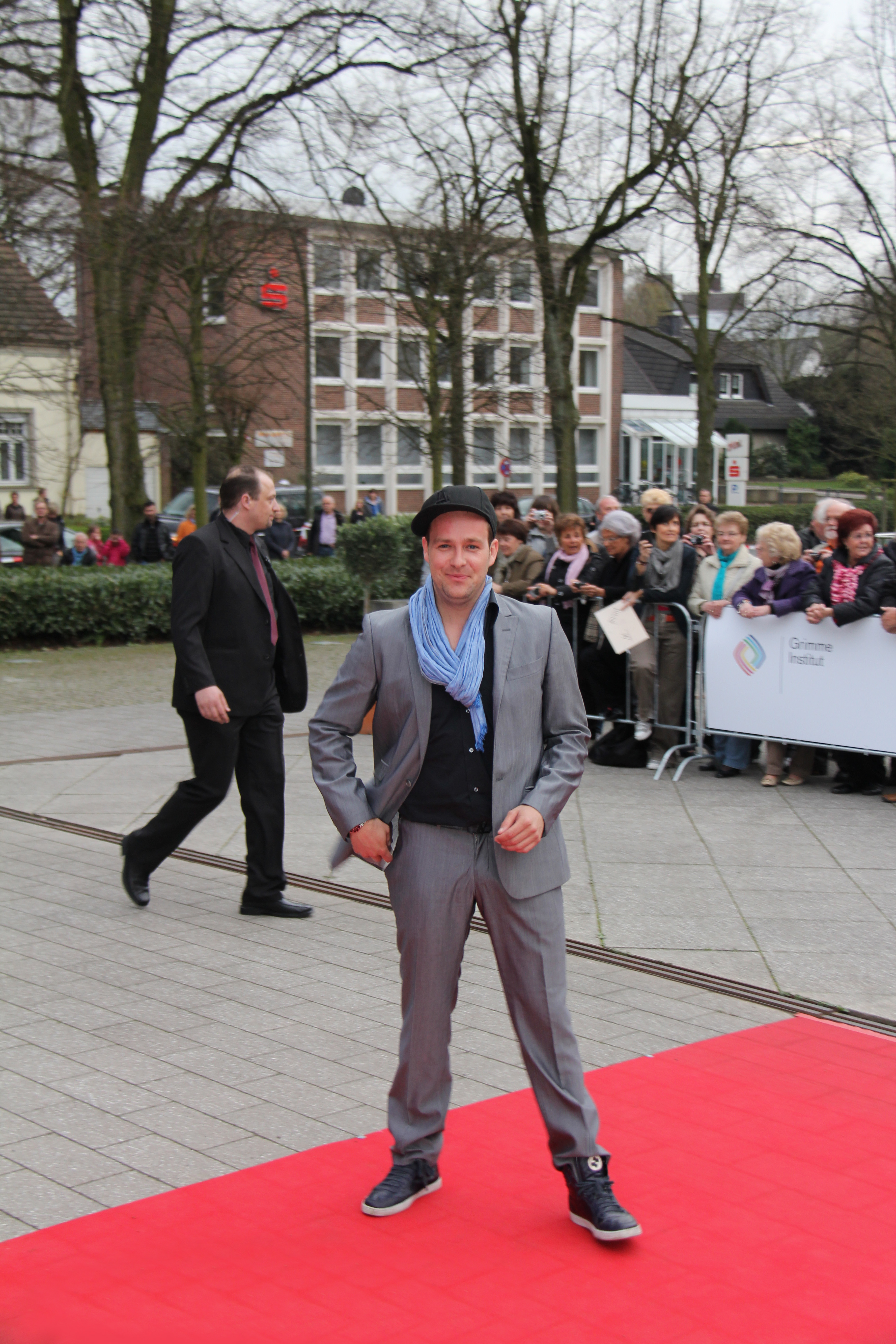 Ben bei der Grimme-Preis-Verleihung 2011